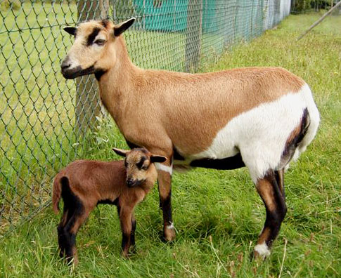 Cameroon sheep